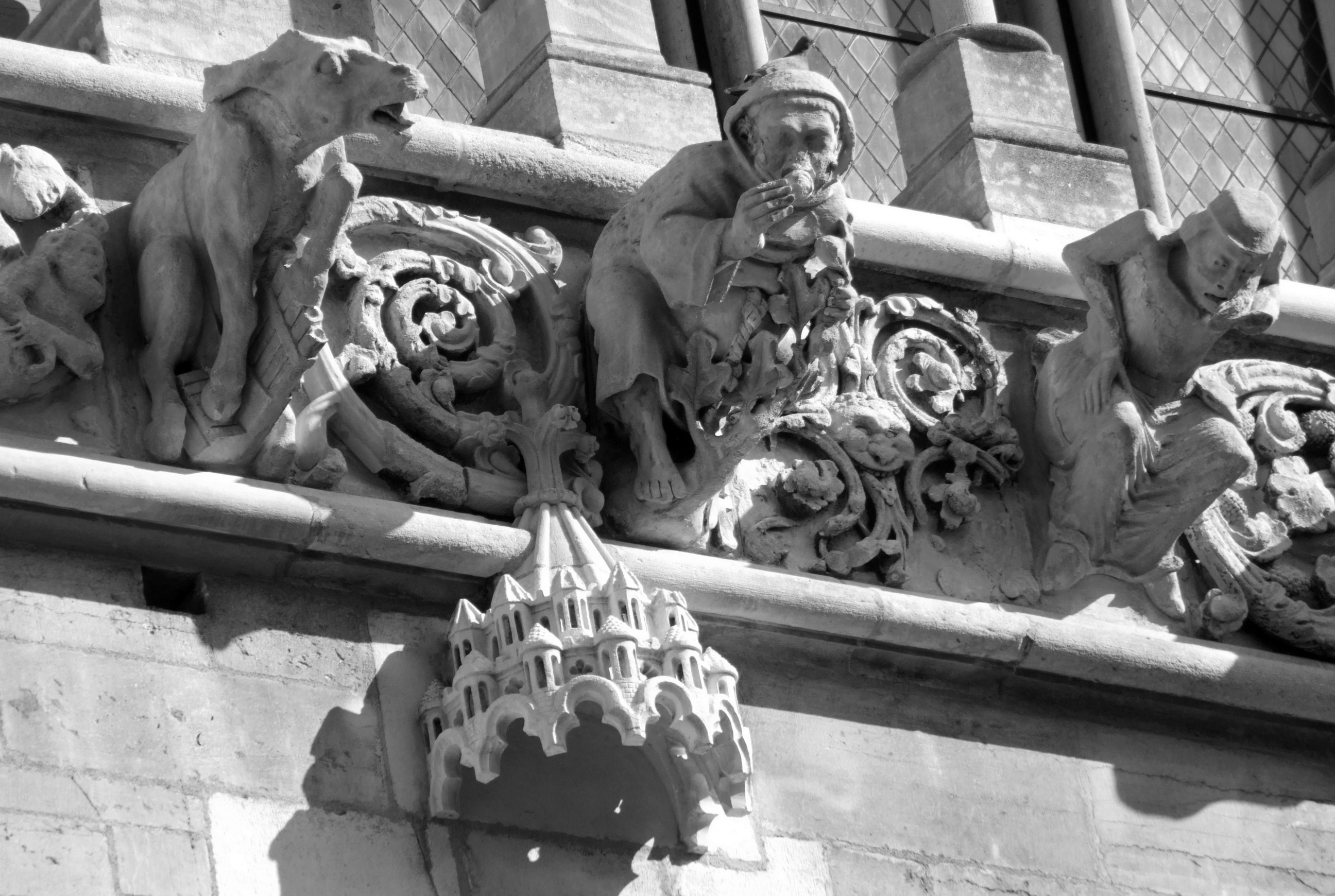 Gargouilles, Église Notre-Dame de Dijon, Dijon, Côte-d'Or, Bourgogne, FRANCE